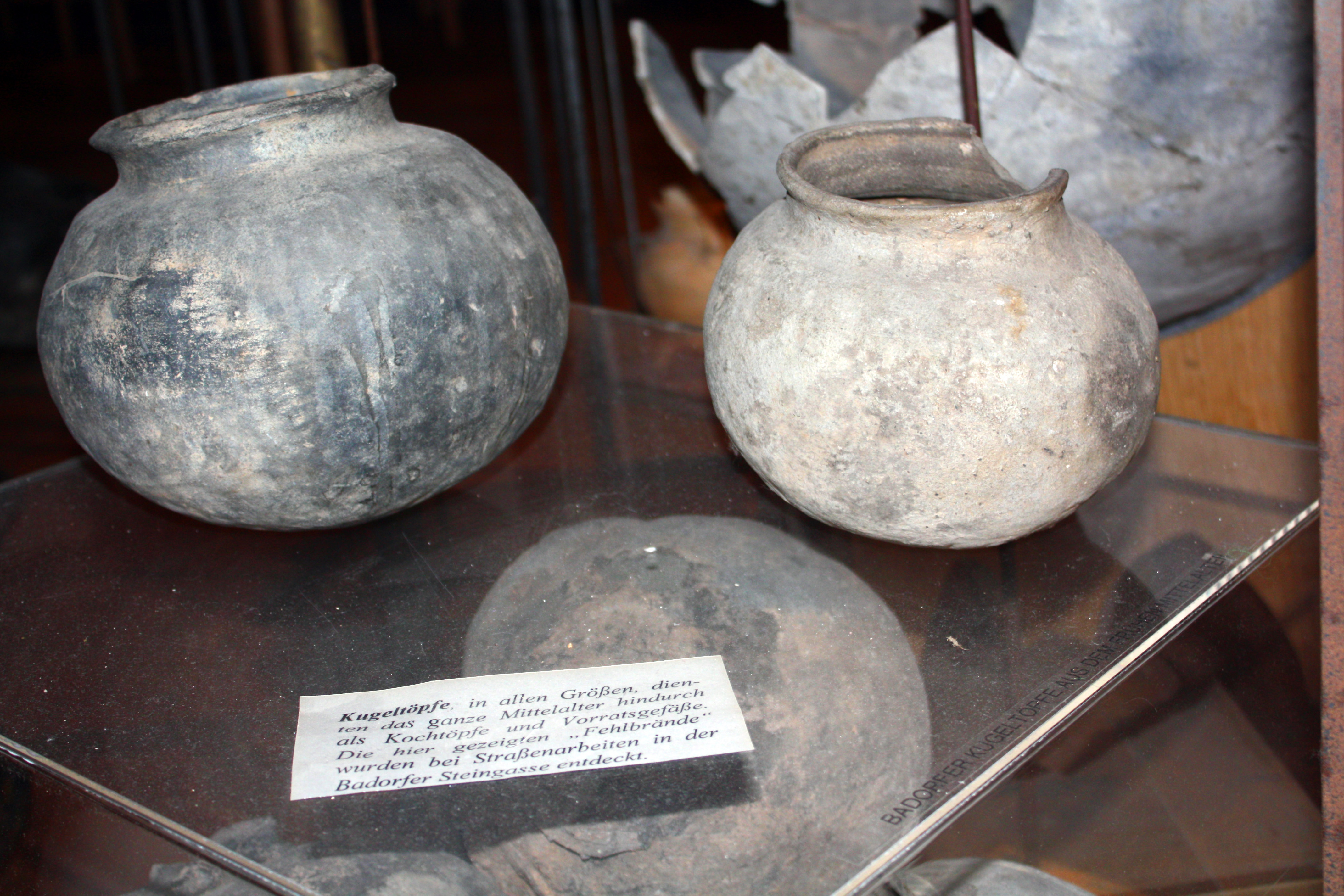 Brühler Keramikmuseum, Kugelgefäße aus der Badorfer Steingasse